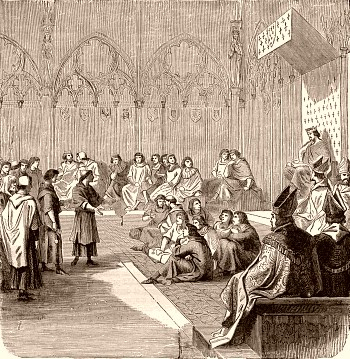 Charles de Navarre est appelé à comparaître, le 4 mars 1353 devant le lit de justice de Jean le Bon.